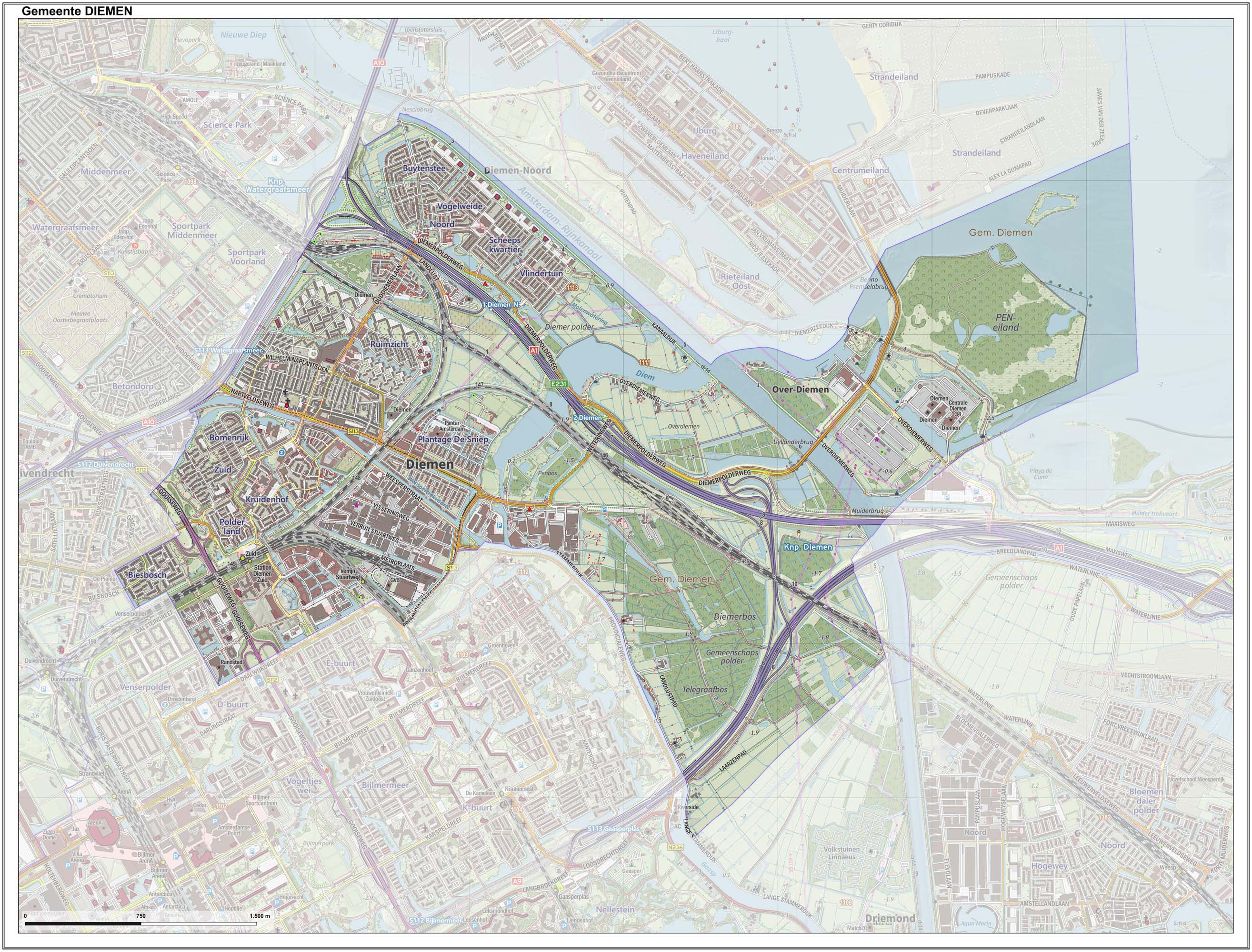 Topografische gemeentekaart. Resolutie: 400 pixels/km. Kaartbeeld samengesteld uit de open geodata van de Top10NL en Top25namen (Kadaster), Creative Commons-BY licentie. Gebouwvlakken uit open geodata BAG extract. Wegen uit de OpenStreetMap, OpenStreetMap community. Reliëfschaduw uit de Actuele Hoogtekaart AHN2. Samenstelling en kleurenschema: Jan-Willem van Aalst, met QGIS. Zie ook de Legenda.